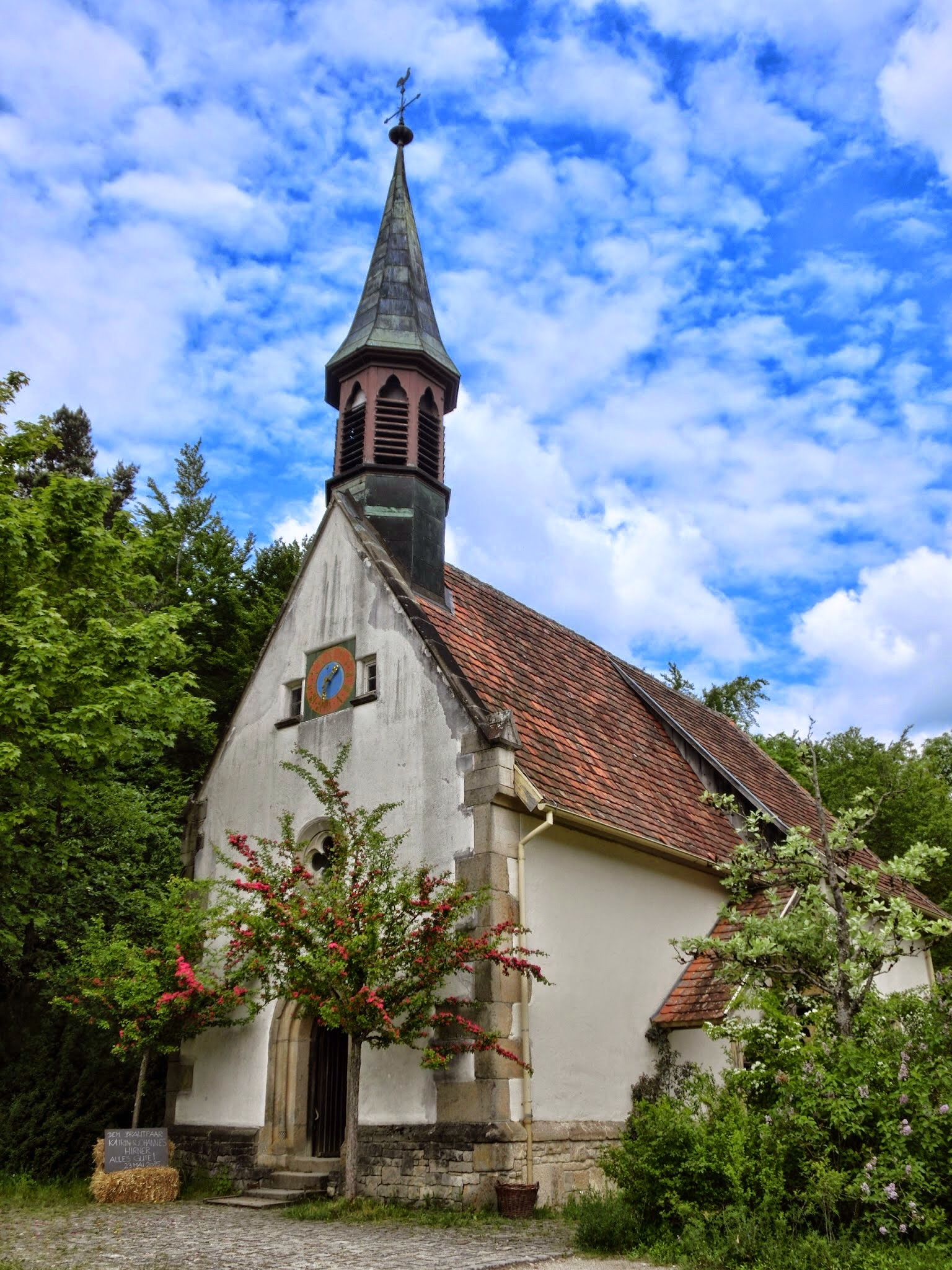 Deutschland - Baden-Württemberg - Landkreis Tuttlingen - Neuhausen ob Eck: Freilichtmuseum, Dorfkirche Tischardt